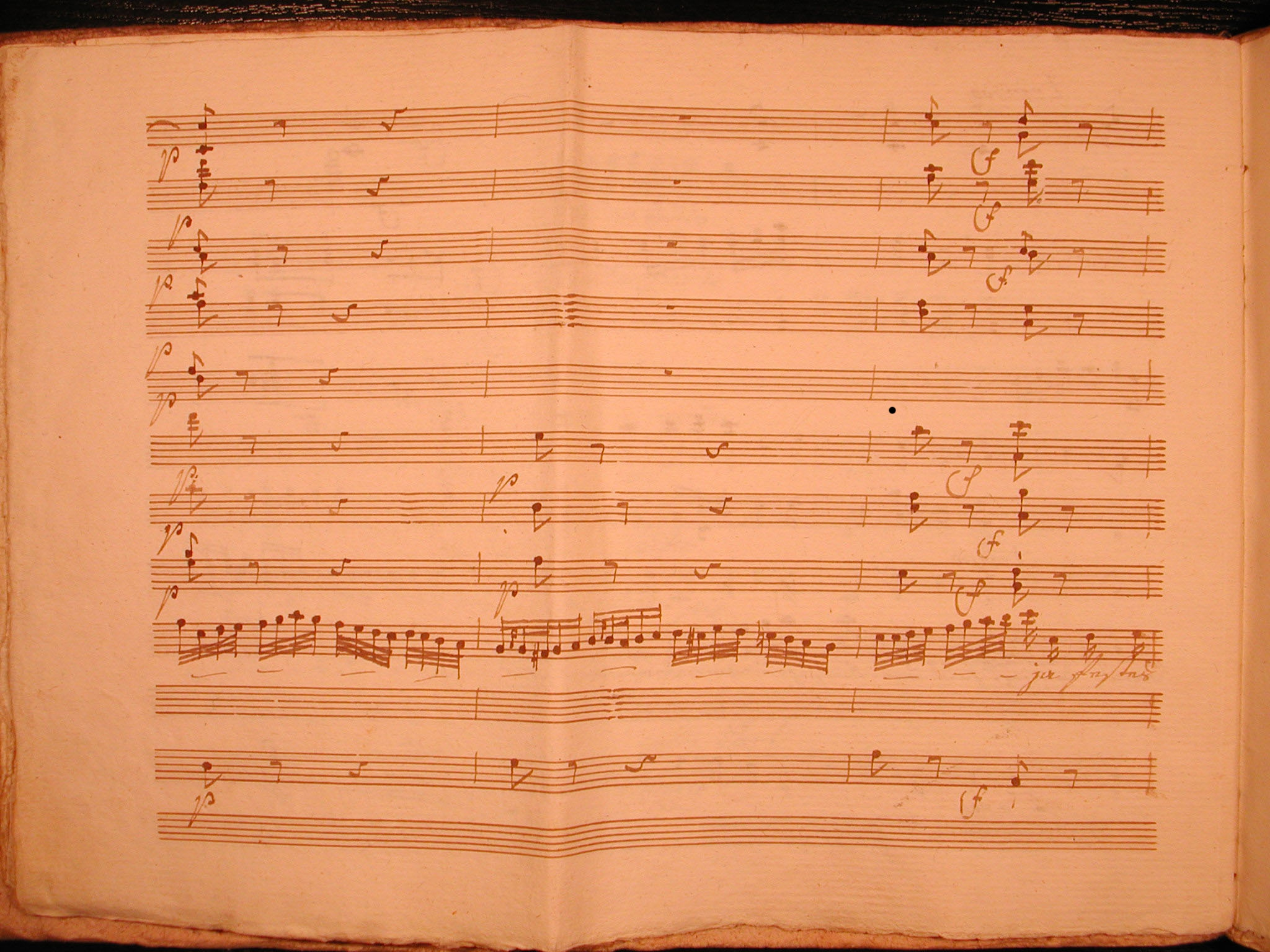 Auszug aus Agnes Sorel von Adalbert Gyowetz: Koloratur auf das Wort "Band" aus der Cavatina der Agnes.